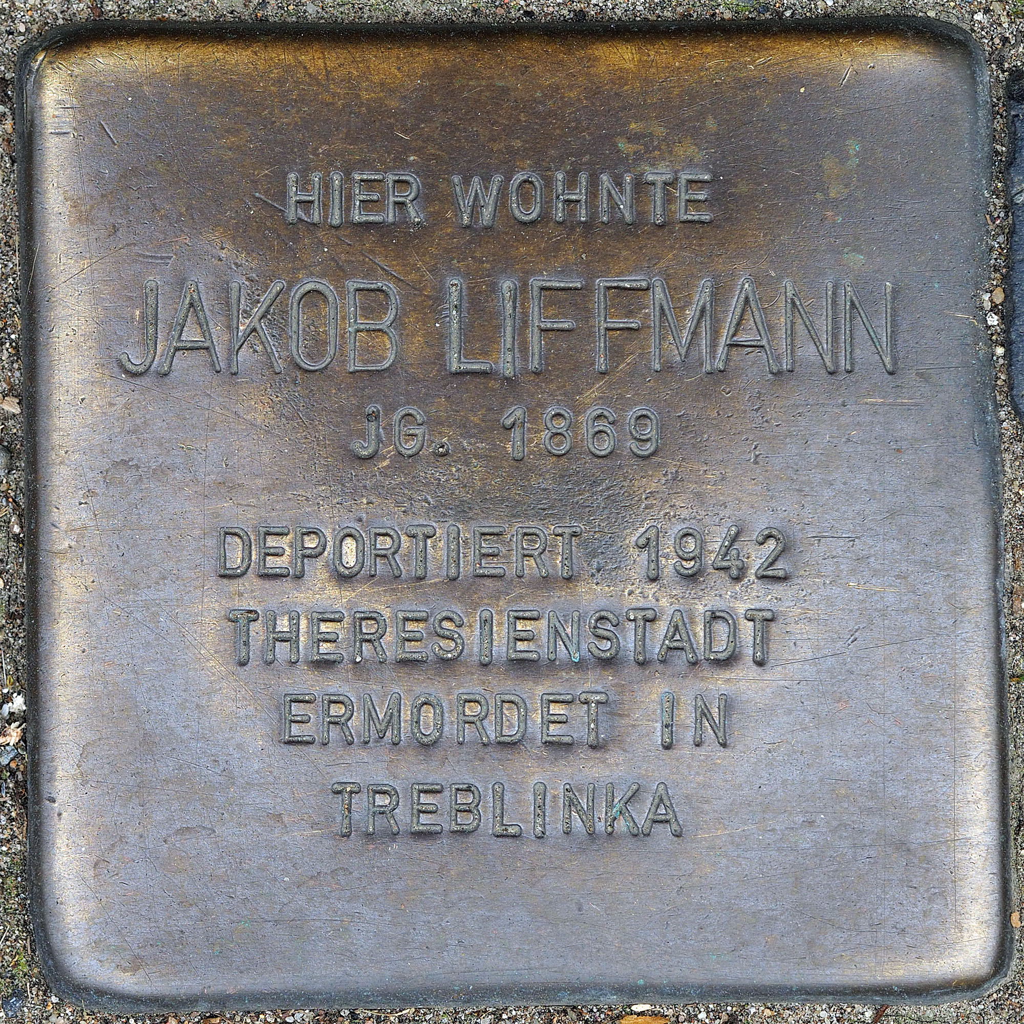 Stolpersteine MG: Liffmann, Jakob